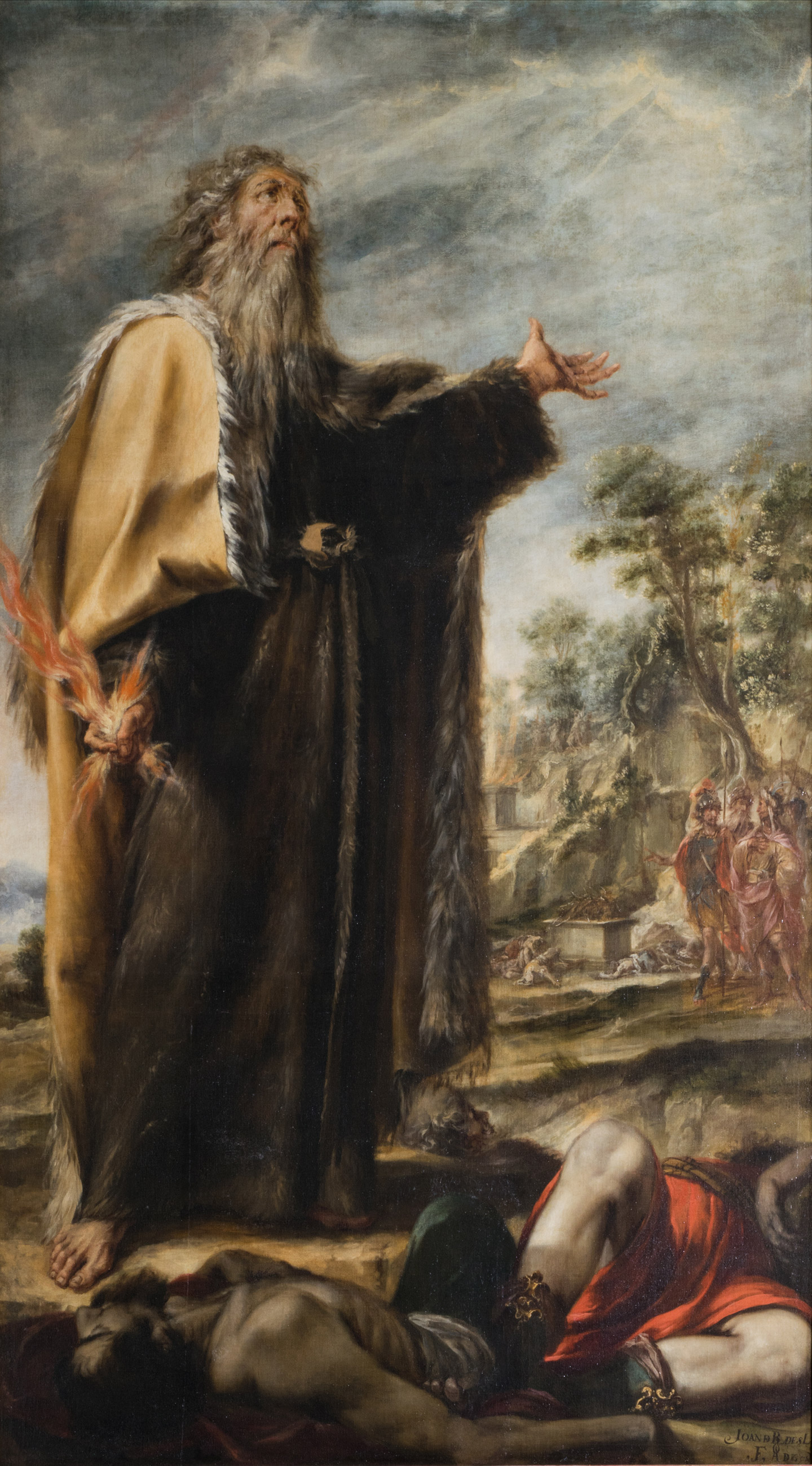 La obra representa al profeta Elías junto a los profetas de Baal, a los que desafió y derrotó.